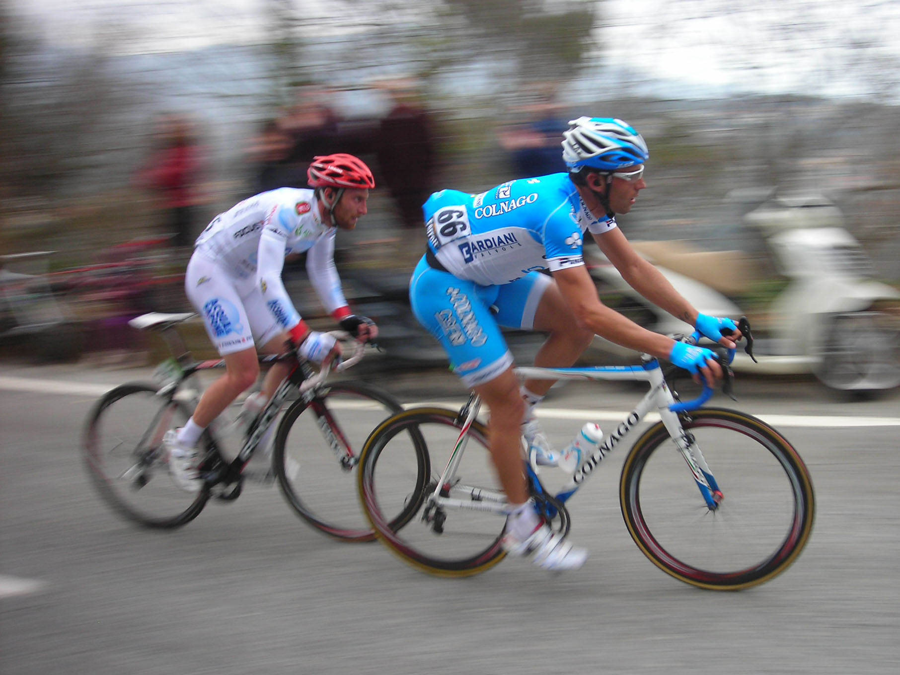 Francesco Ginanni e Marco Coledan sulle Manie